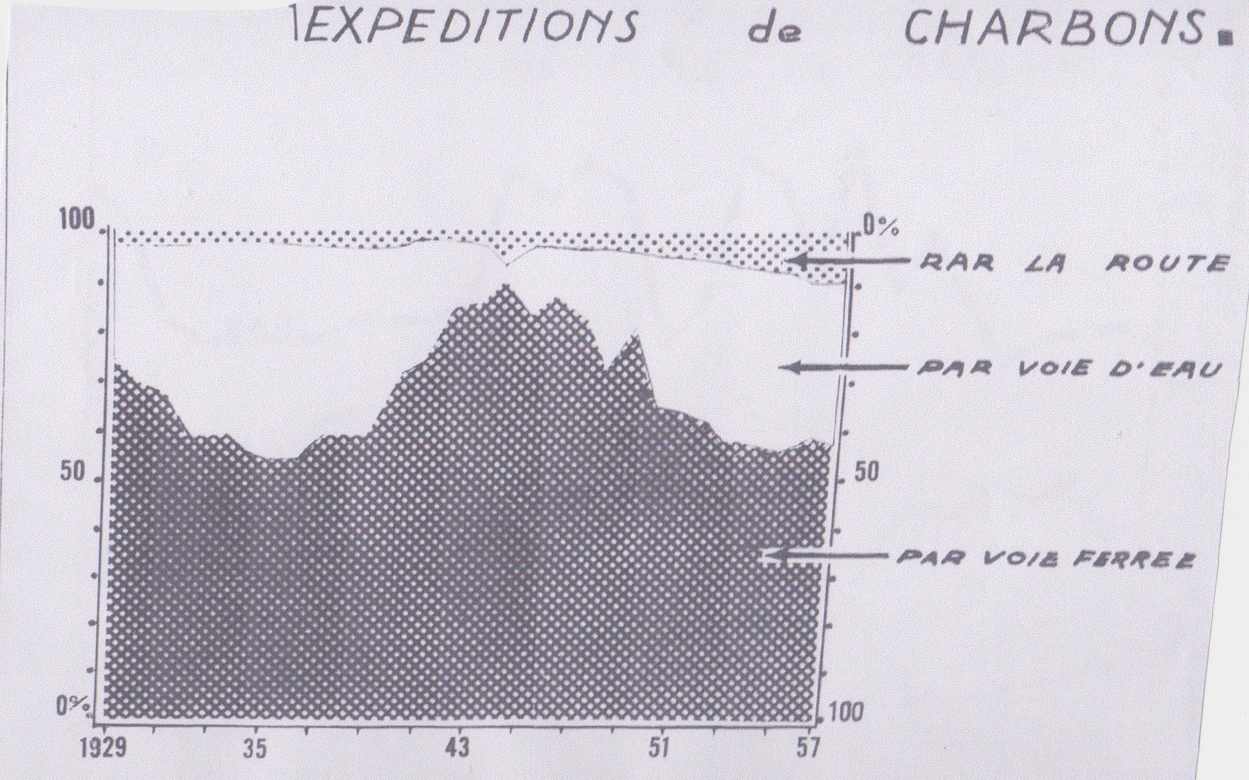 Répartition du trafic de charbon entre route,rail et canal (en %)